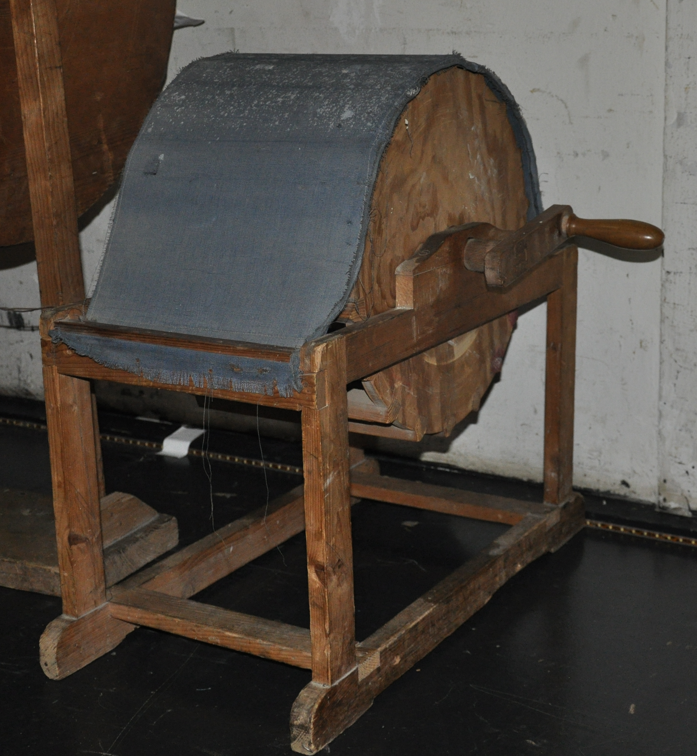 Konzerthaus Ravensburg, historischer Klangerzeuger: Windmaschine